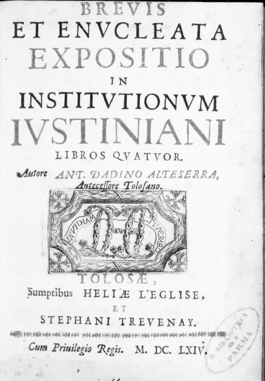 Frontespizio